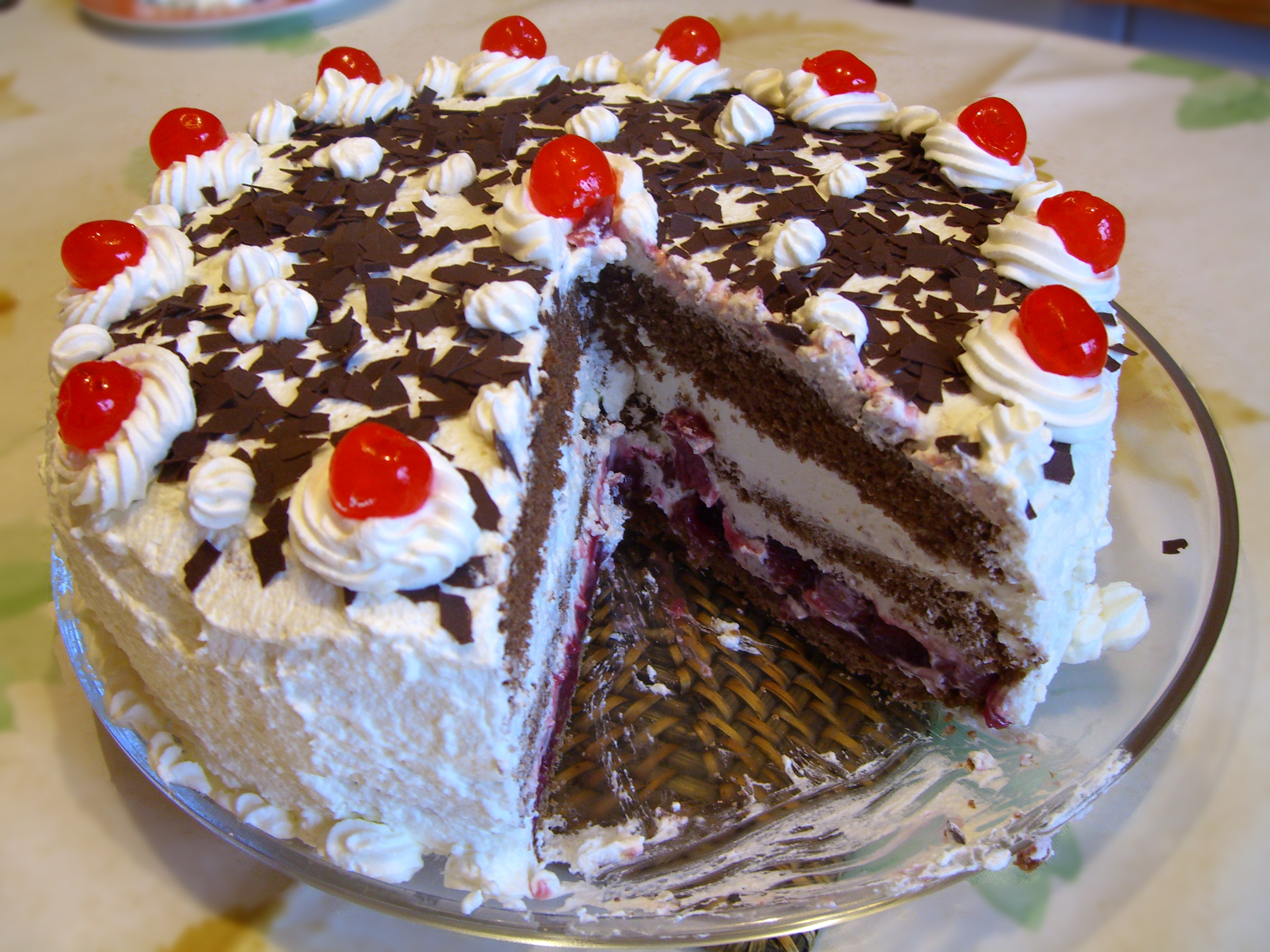 Schwarzwälder Kirschtorte / Black Forest gateau